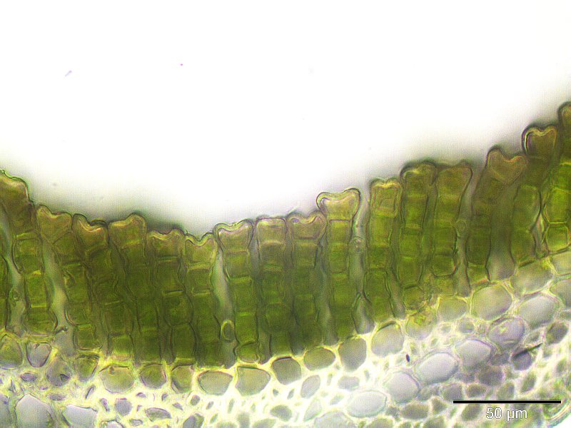 Goldenes Frauenhaar (Polytrichum commune), Assimilationslamellen, Vergrößerung: 400x